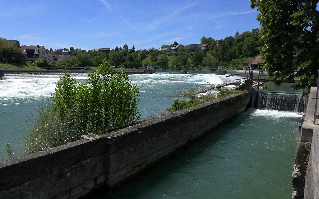 Ehemalige Schiffschleuse an der Reuss bei der Spinnerei Kunz